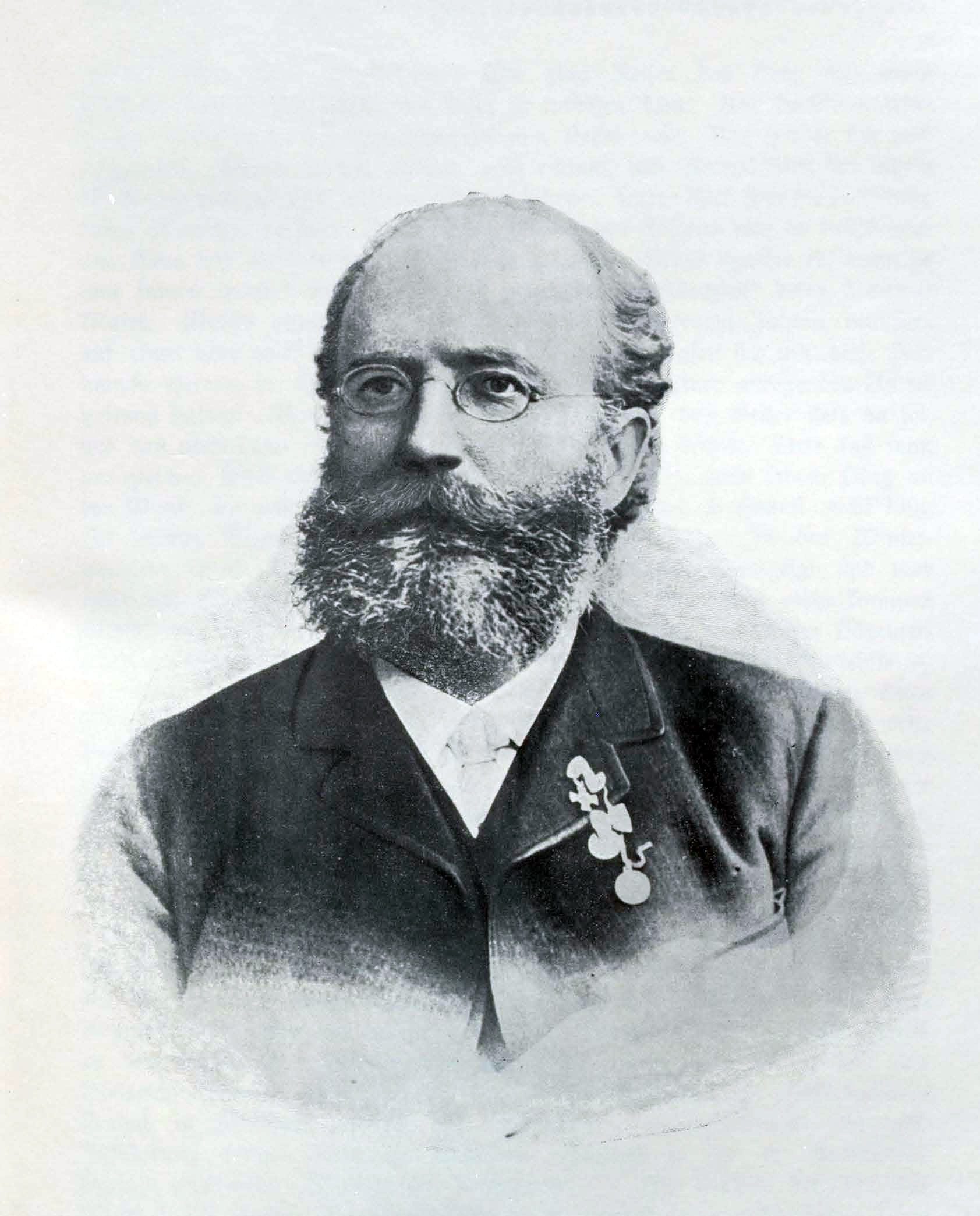 Aus: Reiser, Albert: Lebensbild des Musikdirektors August Reiser, Freiburg 1907